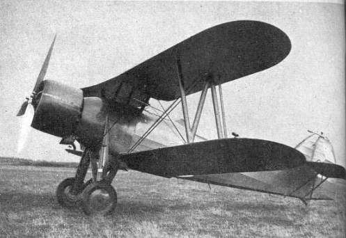 Letov Š-528 (Letectví, březen 1949)